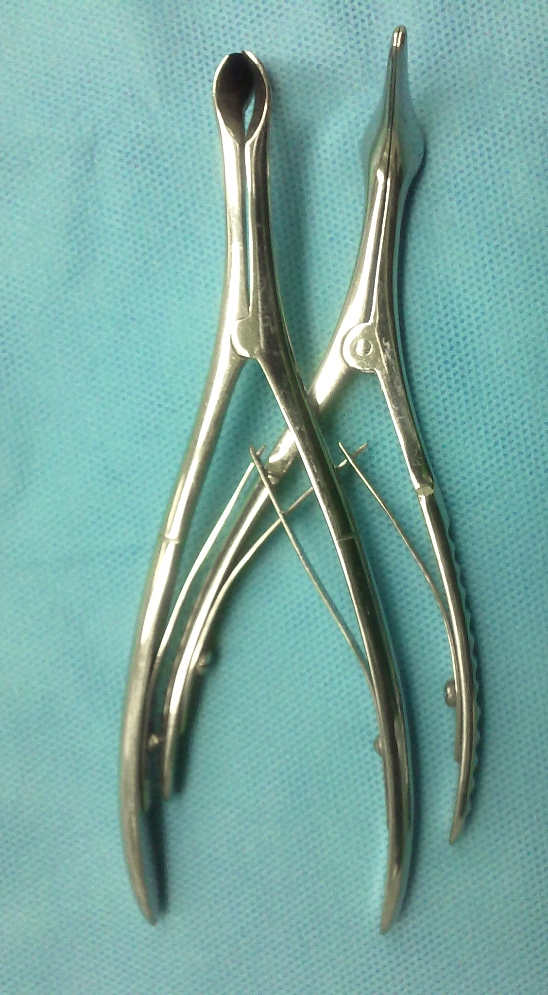 اسپکولوم بینیːوسیله ای است با تیغه های بلند و نازک که با کنار زدن دیواره بینی، باعث نمایان شدن حفره بینی می شود.